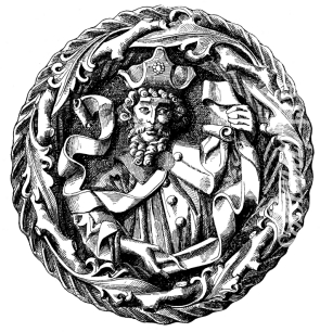 Dietrich Kagelwit, Buchillustration.